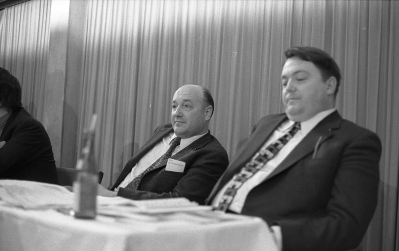 Bundeskongress der Jungsozialisten in der Stadthalle Bonn-Bad Godesberg (links: H. Ehrenberg, rechts: Holger Börner)